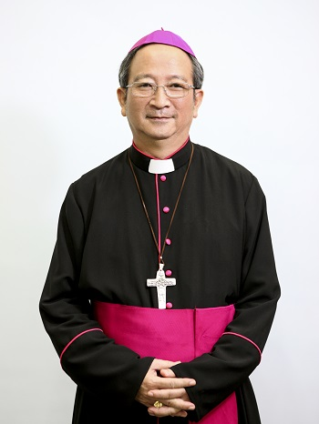 Chân dung Đức Tổng Giám mục Phaolô Bùi Văn Đọc, Tổng Giám mục Tổng Giáo phận Sài Gòn